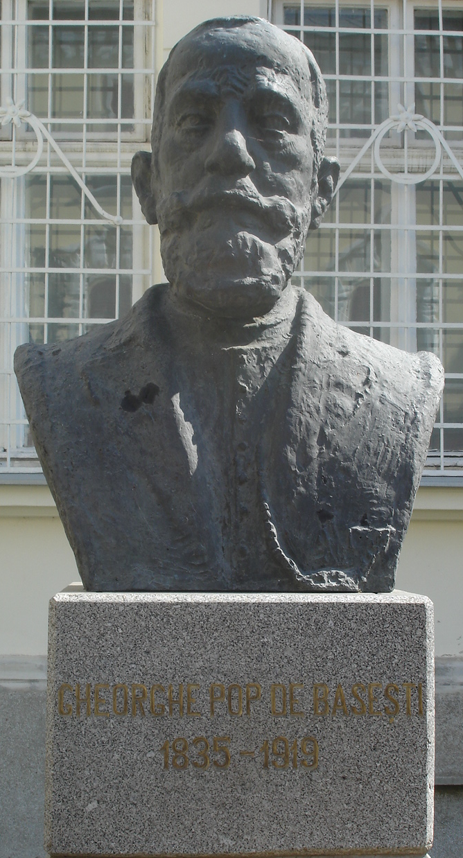 Gheorghe Pop de Băseşti